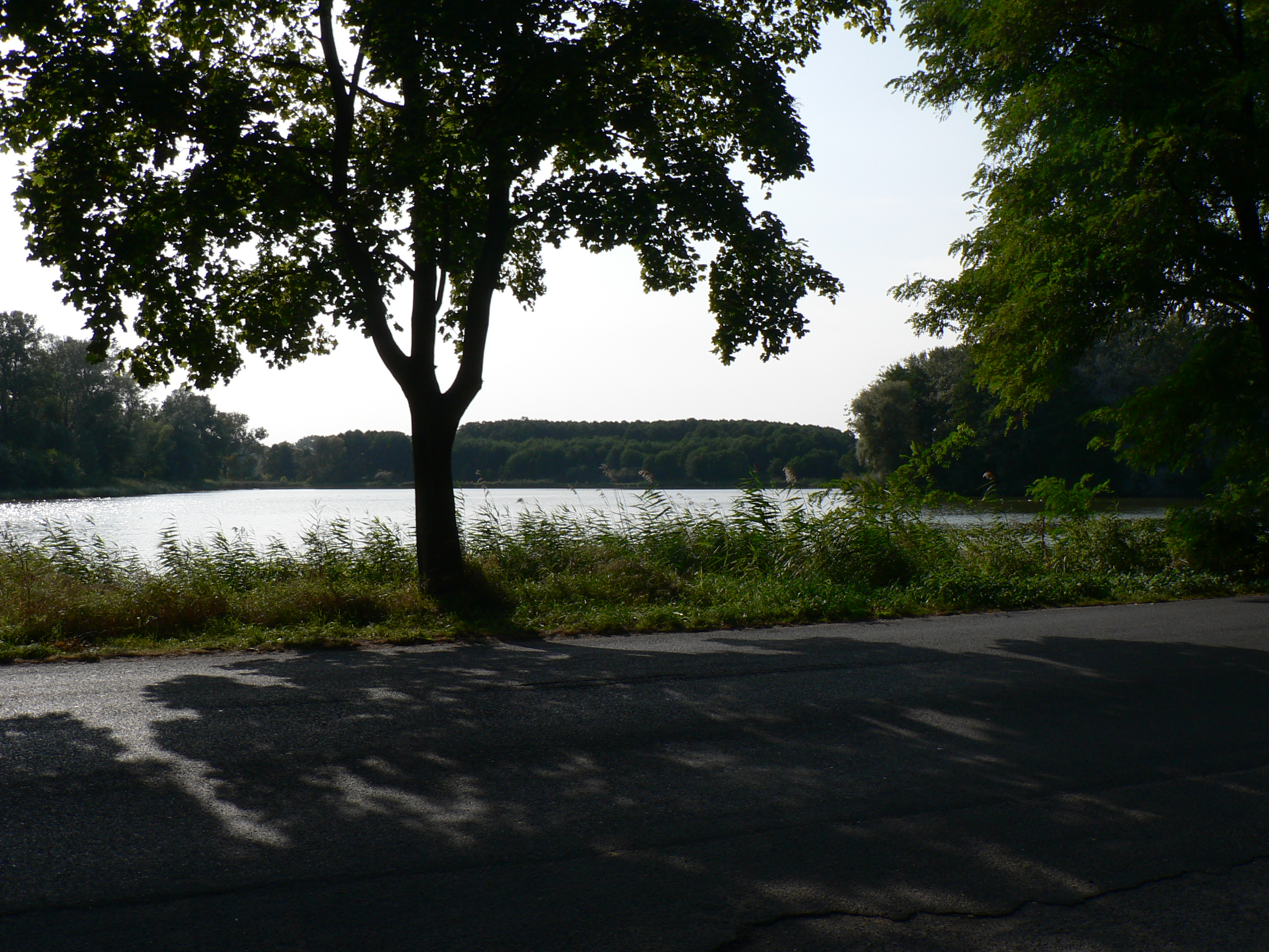 Stawy Raszyńskie, Staw Falencki